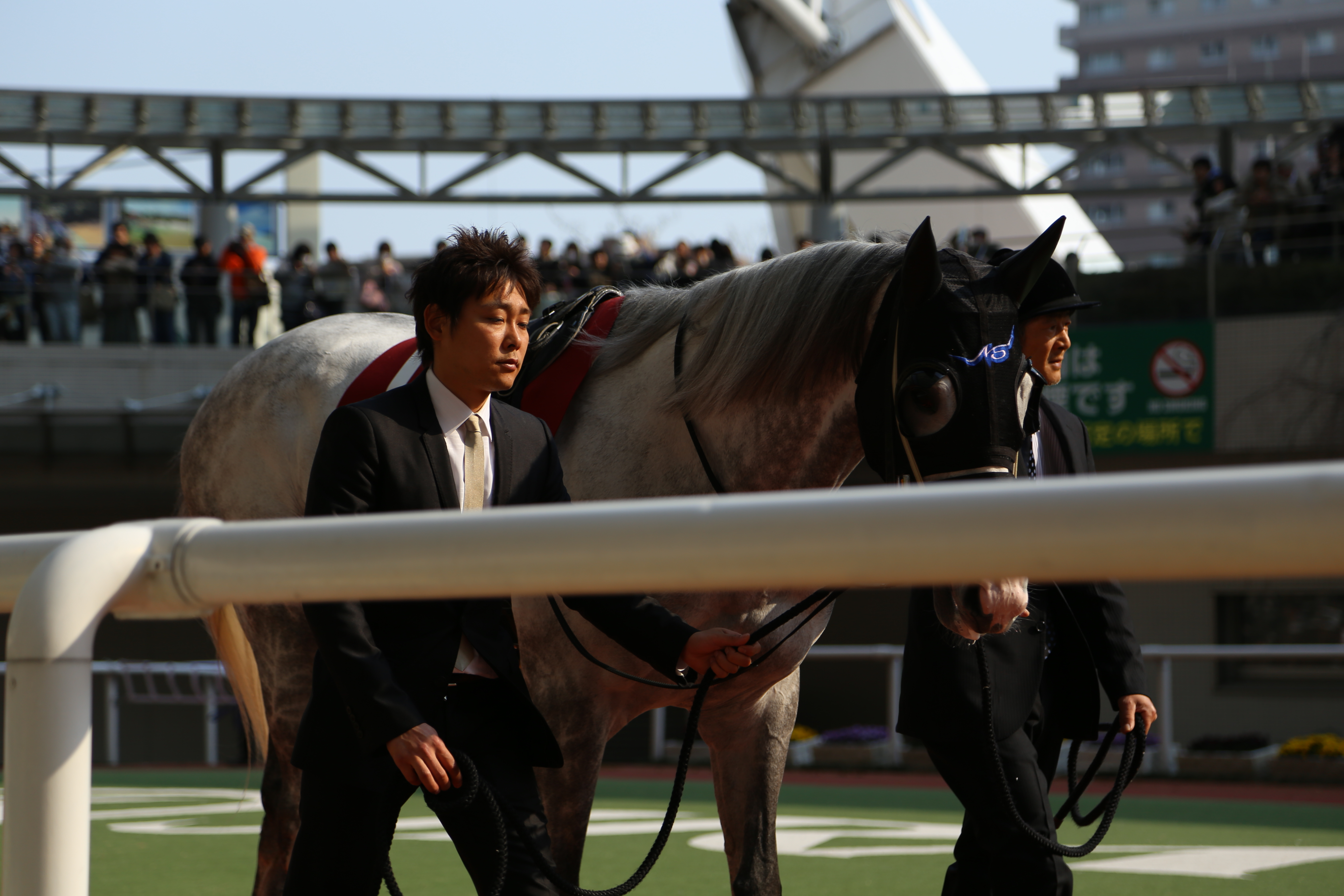 2014年阪神大賞典でのゴールドシップ